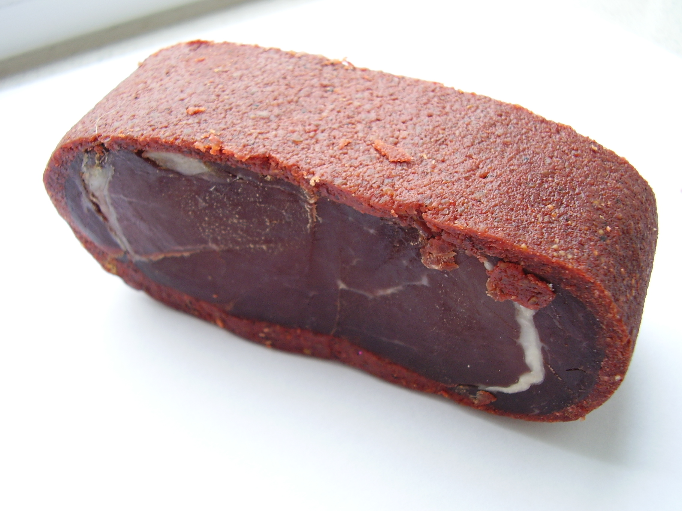 бастурма, Basturma or Pastroma from Armenia, luftgetrockneter Schinken im Paprikamantel, Paprika leicht scharf, mit etwas Knoblauch im Paprika